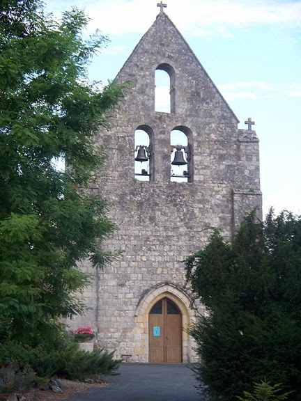 Commune de Sainte Sabine Born, dans le département de la Dordogne (24), en France : l'église Sainte-Sabine.